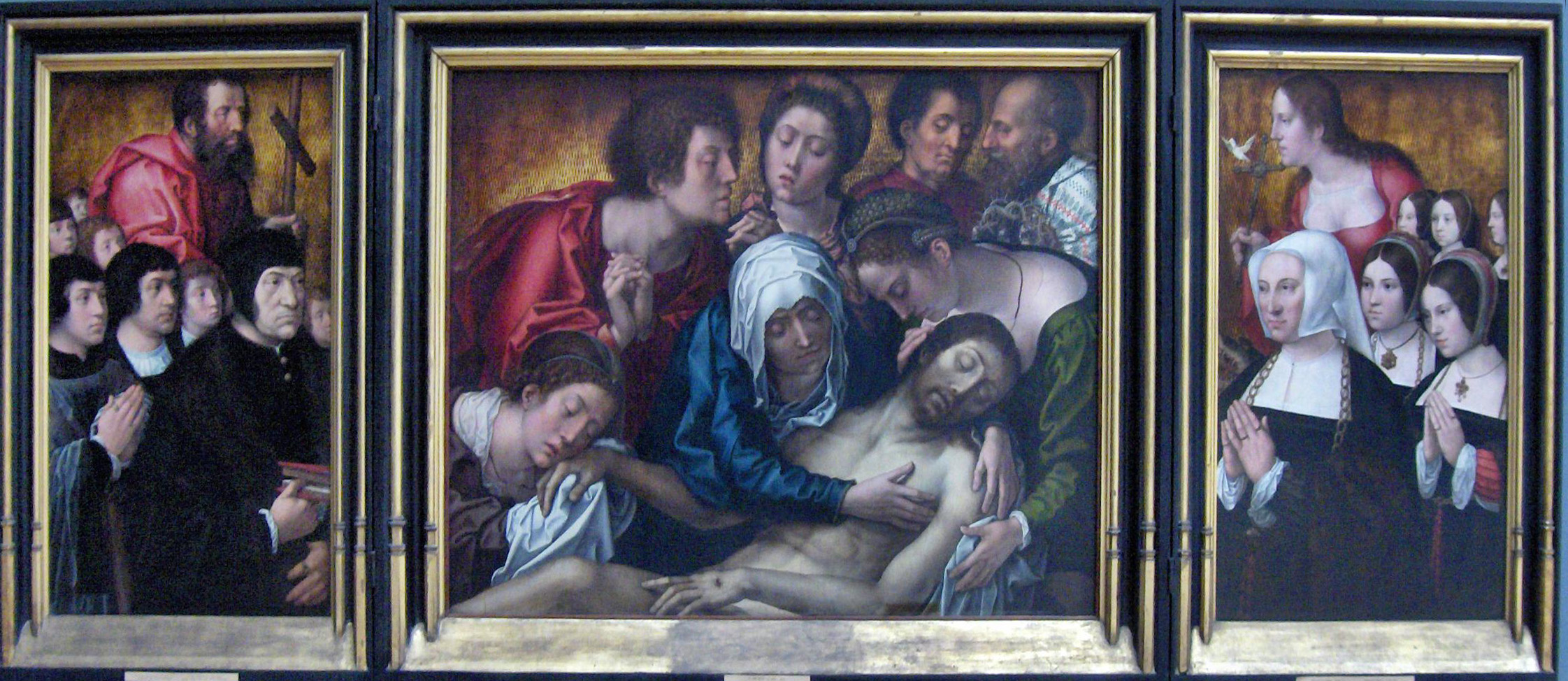 Haneton triptiek; links : Philippe Haneton en zijn zeven zonen, door de H. Filippus aanbevolen; centraal : graflegging; rechts : Marguerite Numan, zijn echtgenote, en haar zeven dochters, aanbevolen door de H. Margareta; door Bernard van Orley (1487/88 - 1541); KMSKB, Brussel